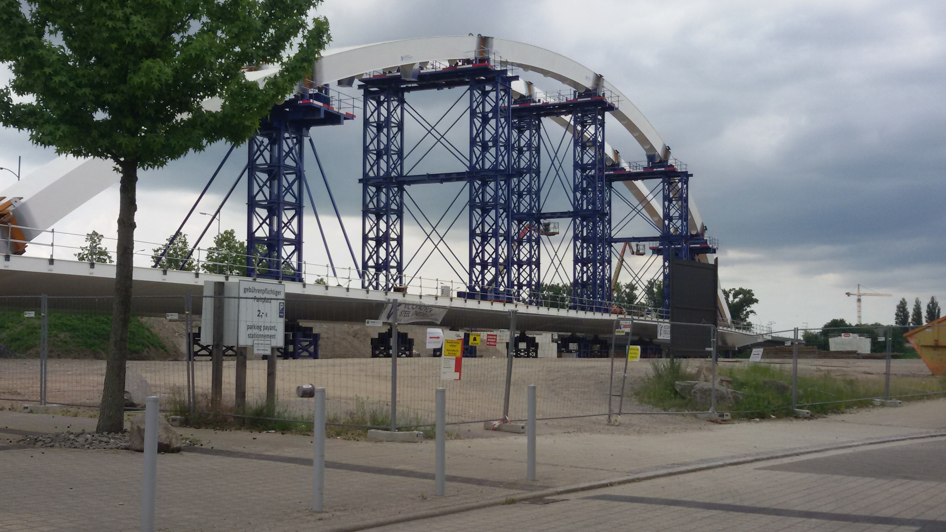 Im Bau befindliche Brückenteile am Ufer Kehl.